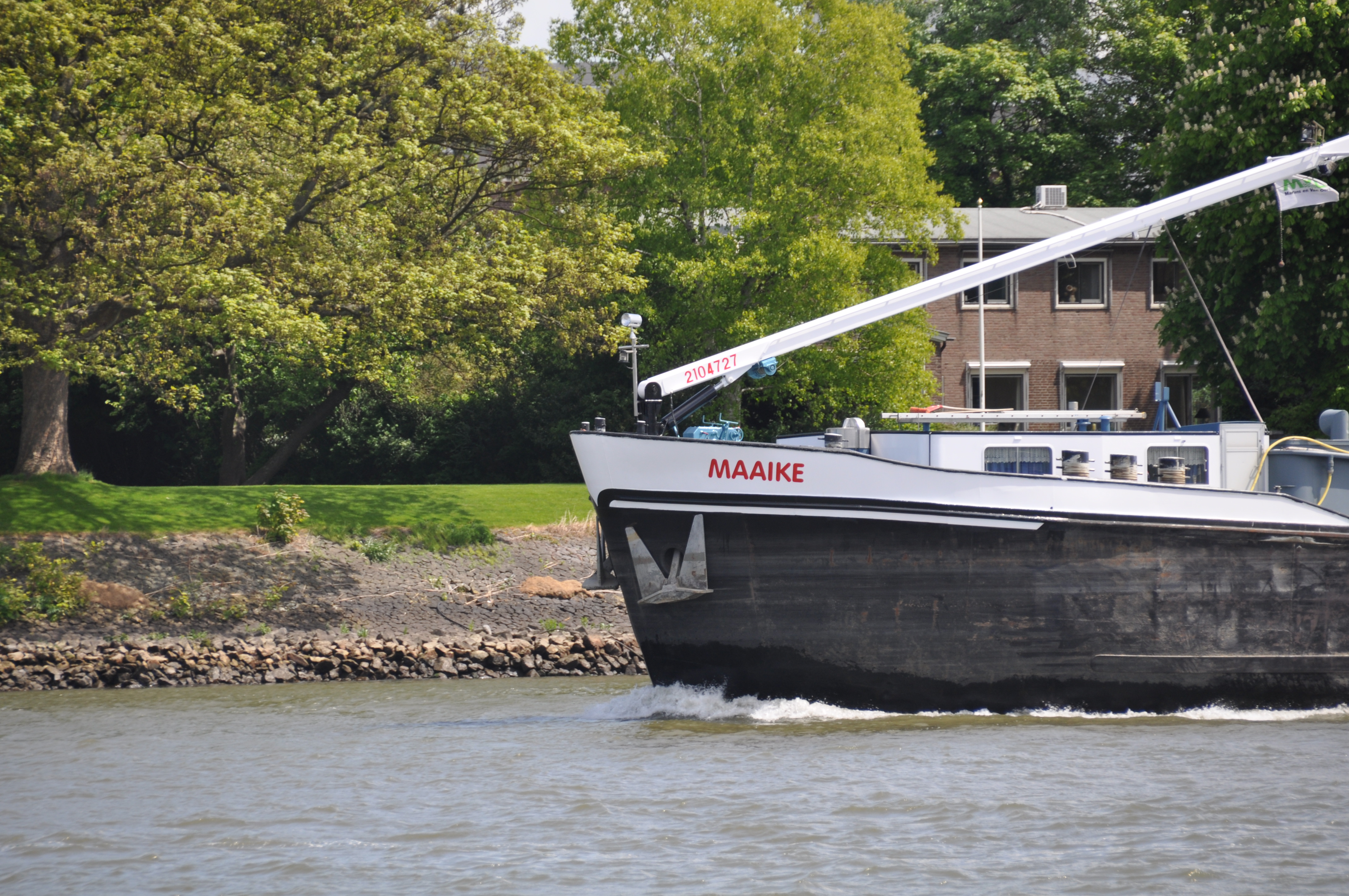 De MAAIKE komt de Noord uit en draait de Nieuwe Maas op bij de splitsing met de Lek.